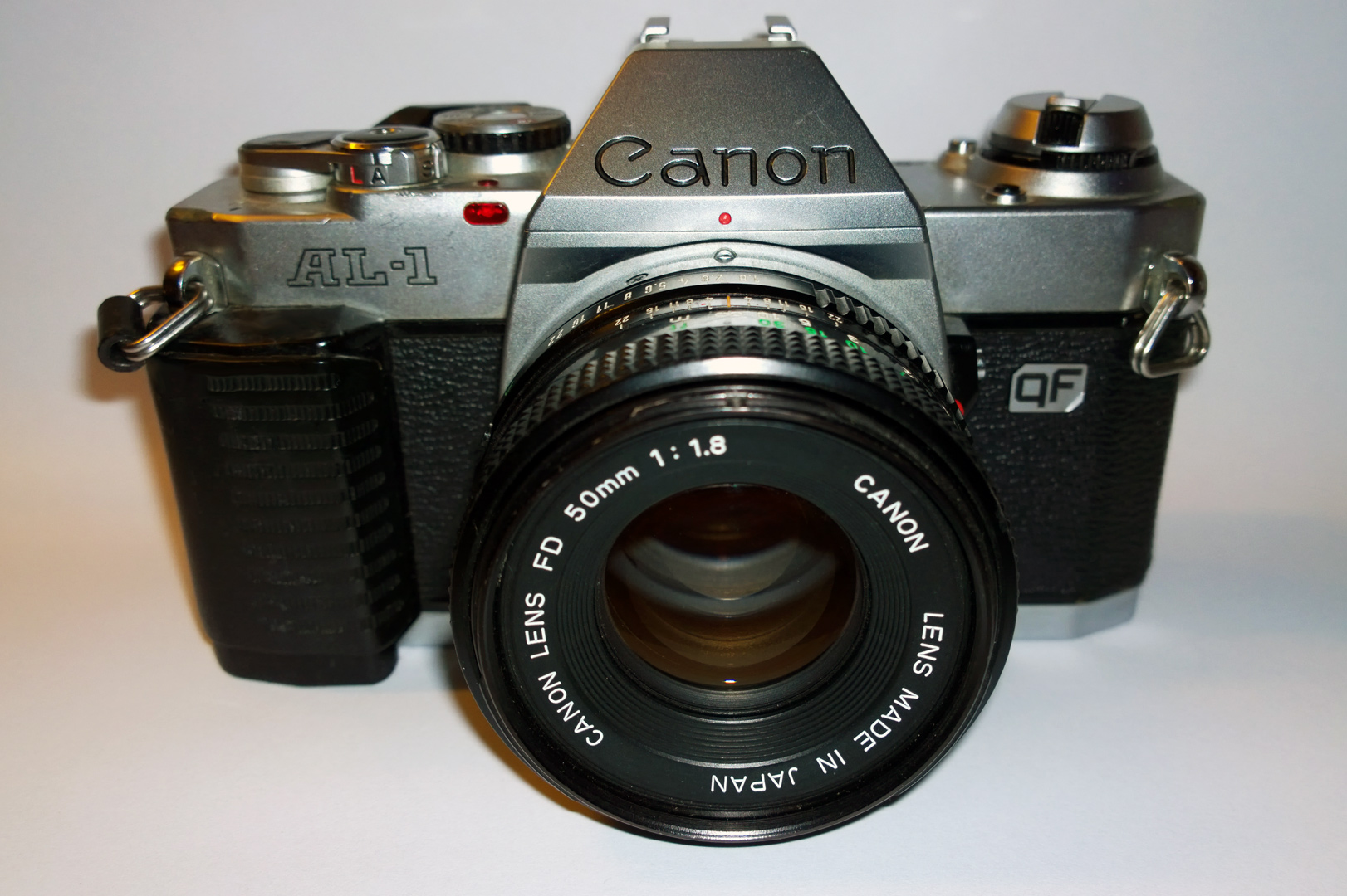 Canon AL-1 silberfarben